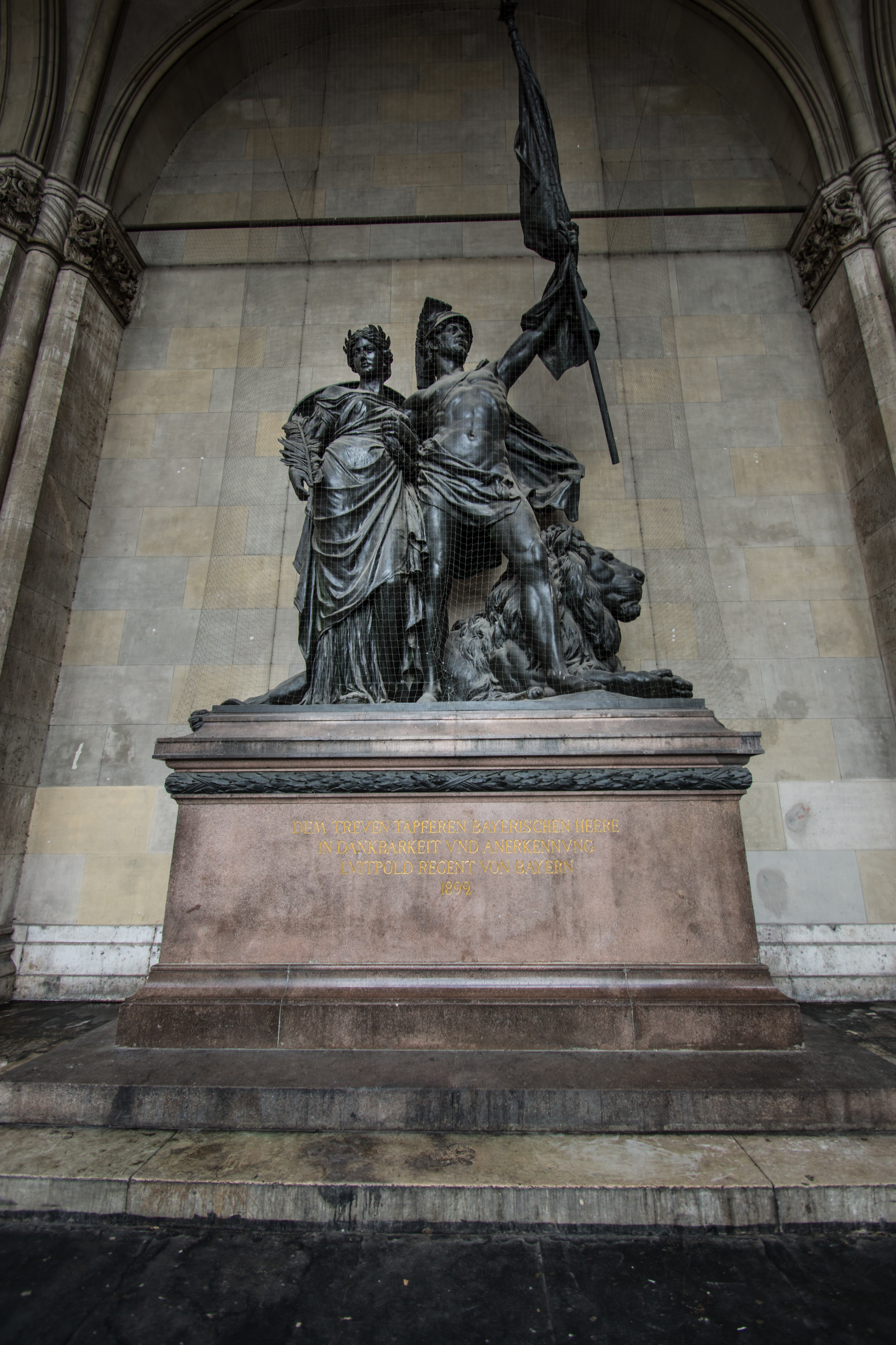 Estatua en FeldherrenhalleThis is a photograph of an architectural monument.